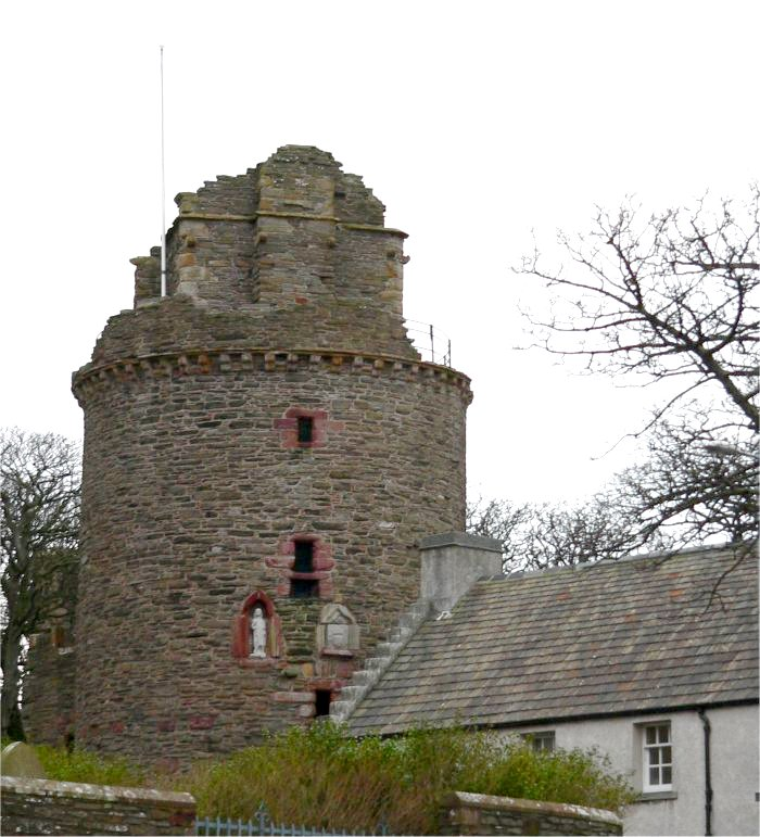 The Bishop's Palace, Kirkwall, Orkney